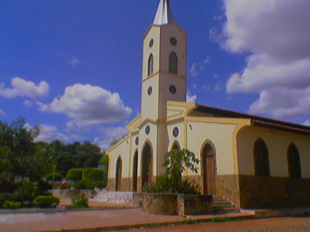 A Igreja da Matriz, localizada no centro da cidade de Timbiras, Maranhão